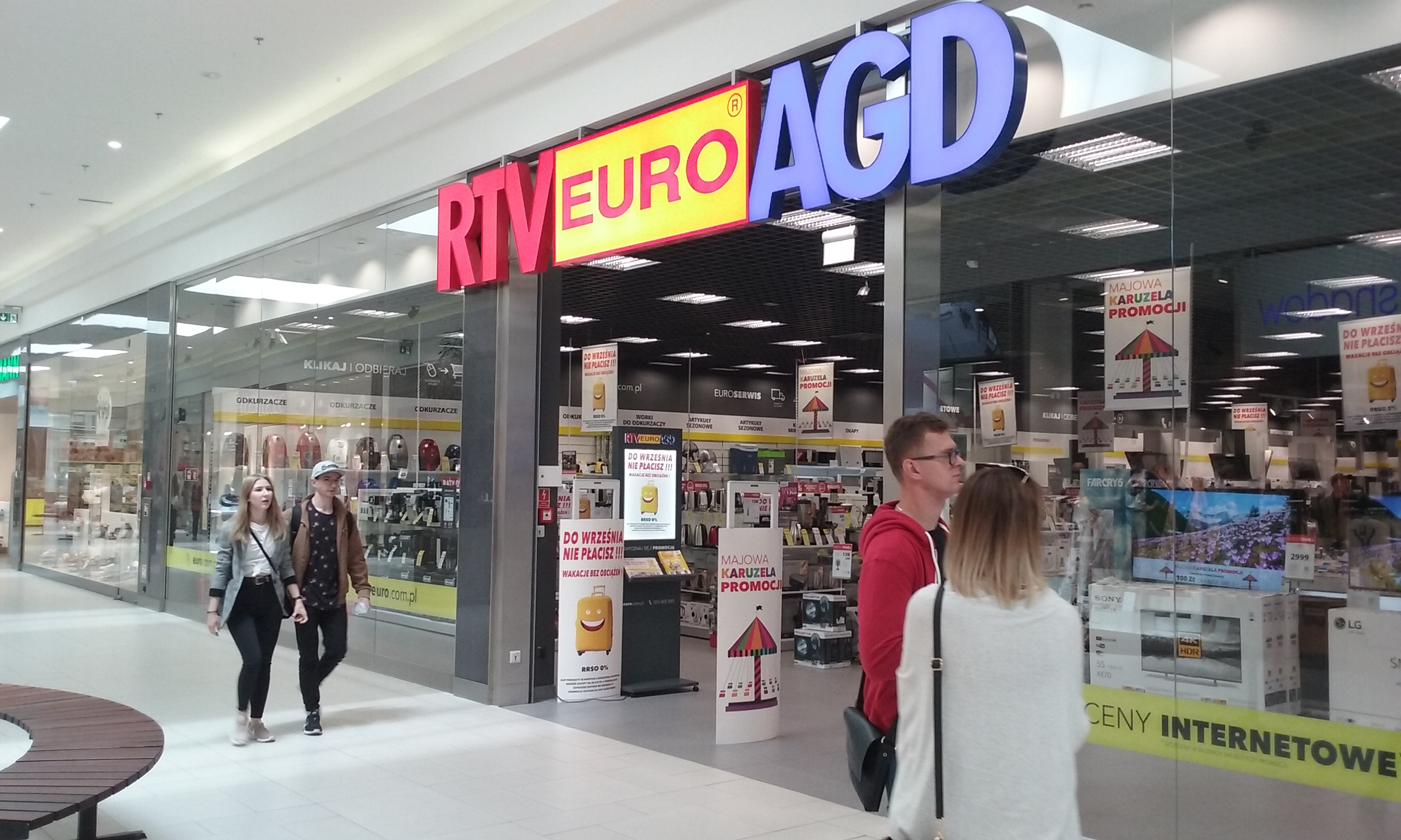 Salon RTV Euro AGD w sześćdziesięcio tysięcznym Tomaszowie Mazowieckim, w województwie łódzkim. Galeria "Tomaszów"